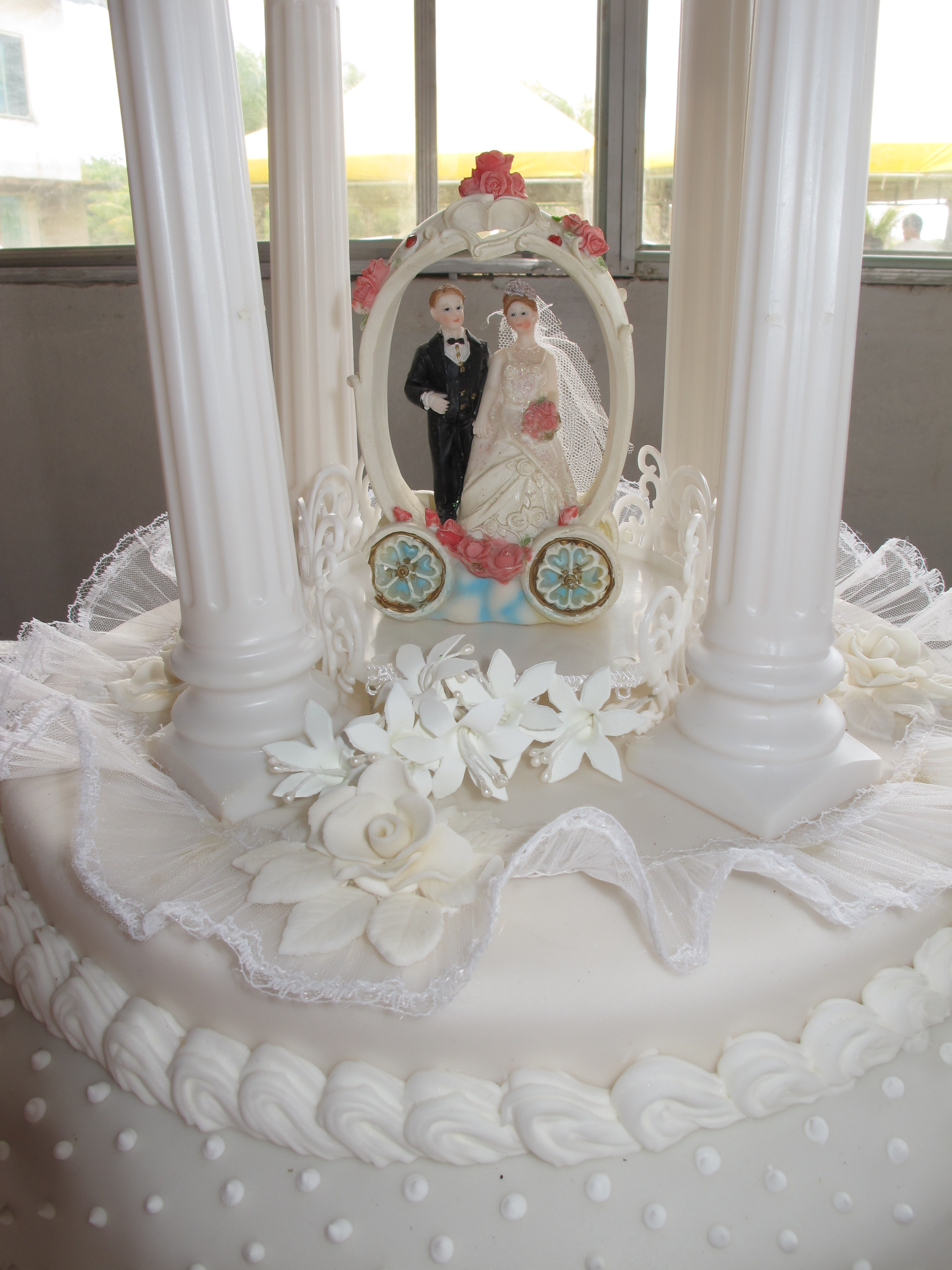 Bonecos em bolo na cidade de Alcobaça, Bahia, Brasil.